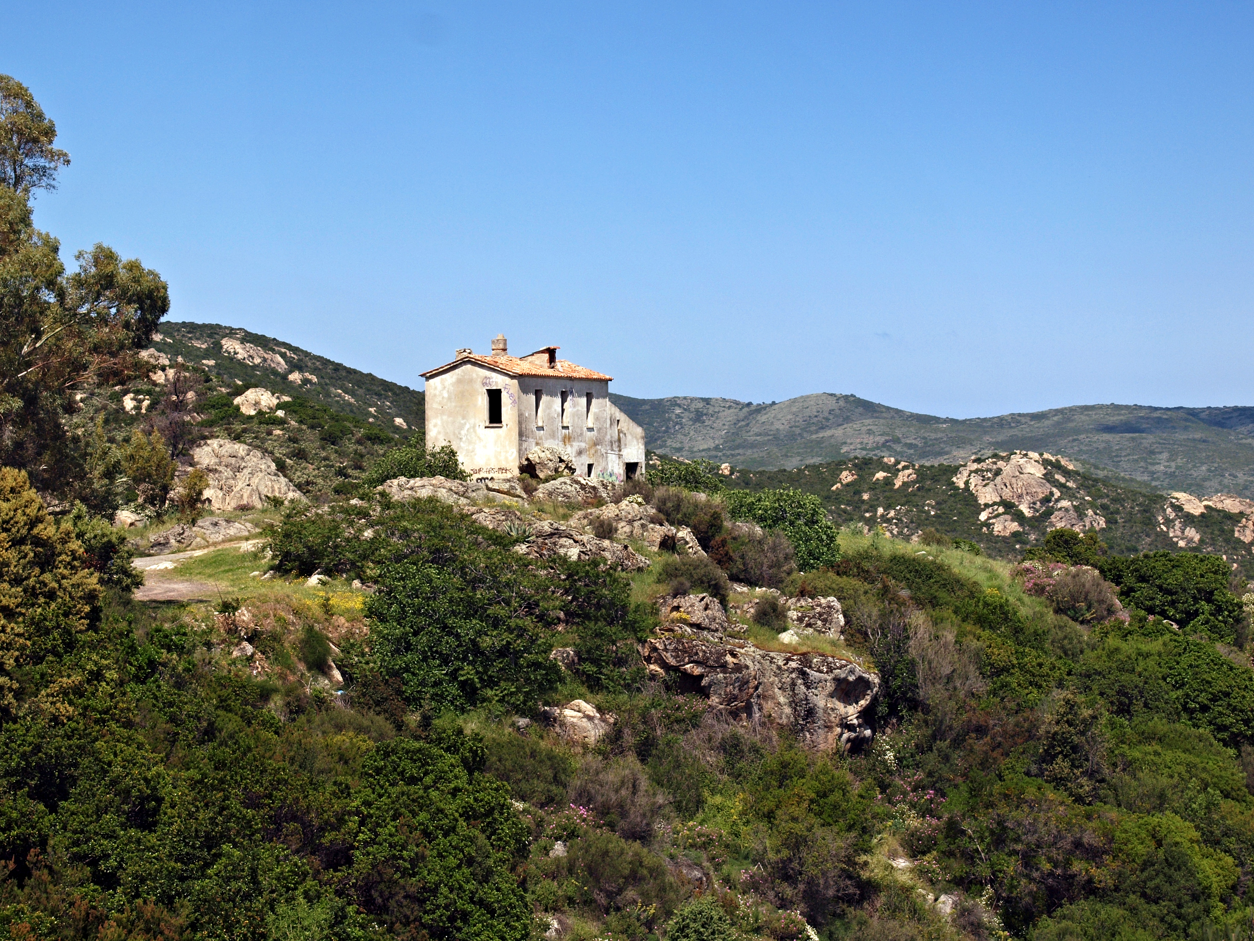 Santo-Pietro-di-Tenda, Nebbio (Corse) - L'ancienne maison cantonière de Baccialu dans le Désert des Agriates